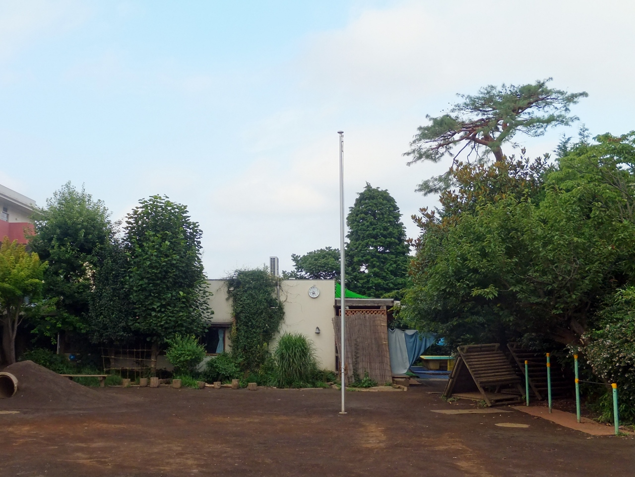 柳橋保育園 2016年7月17日撮影